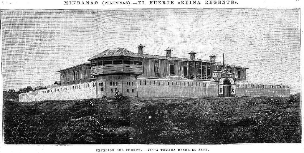 Exterior del fuerte. Vista tomada desde el Este.